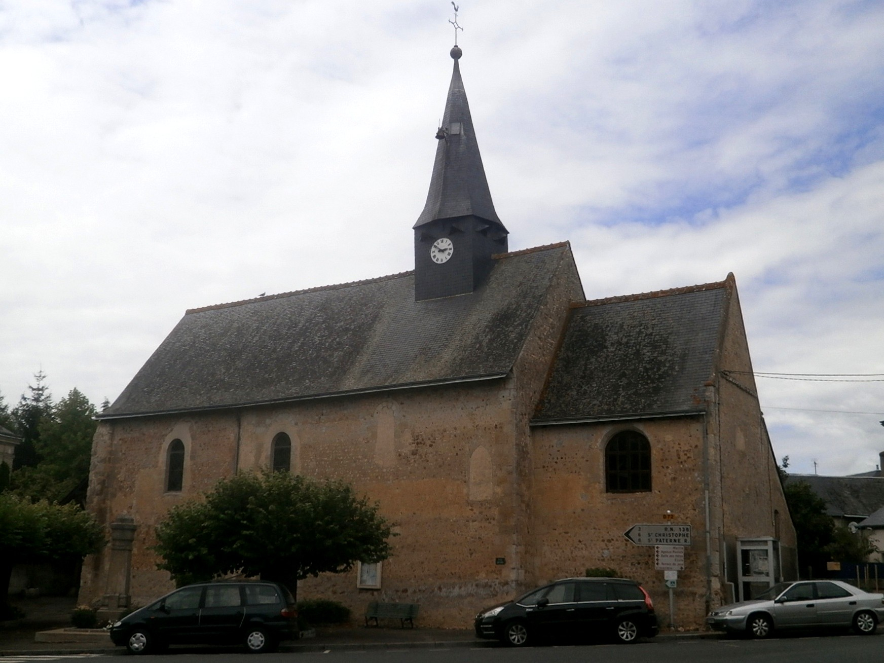 L'église